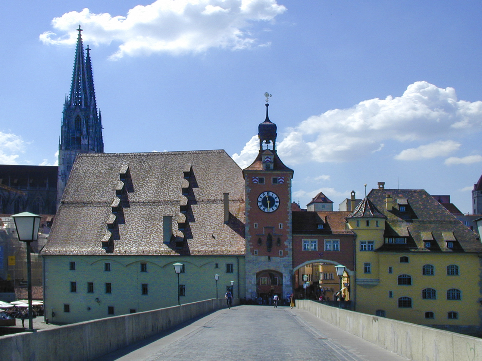 Regensburger Stadttor an der Donau mitsamt Salzstadel und Hohem Dom St. Peter im Hintergrund